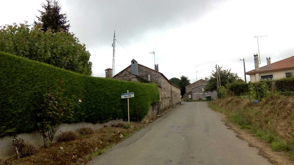 Vista de Abeledo, Curtis.